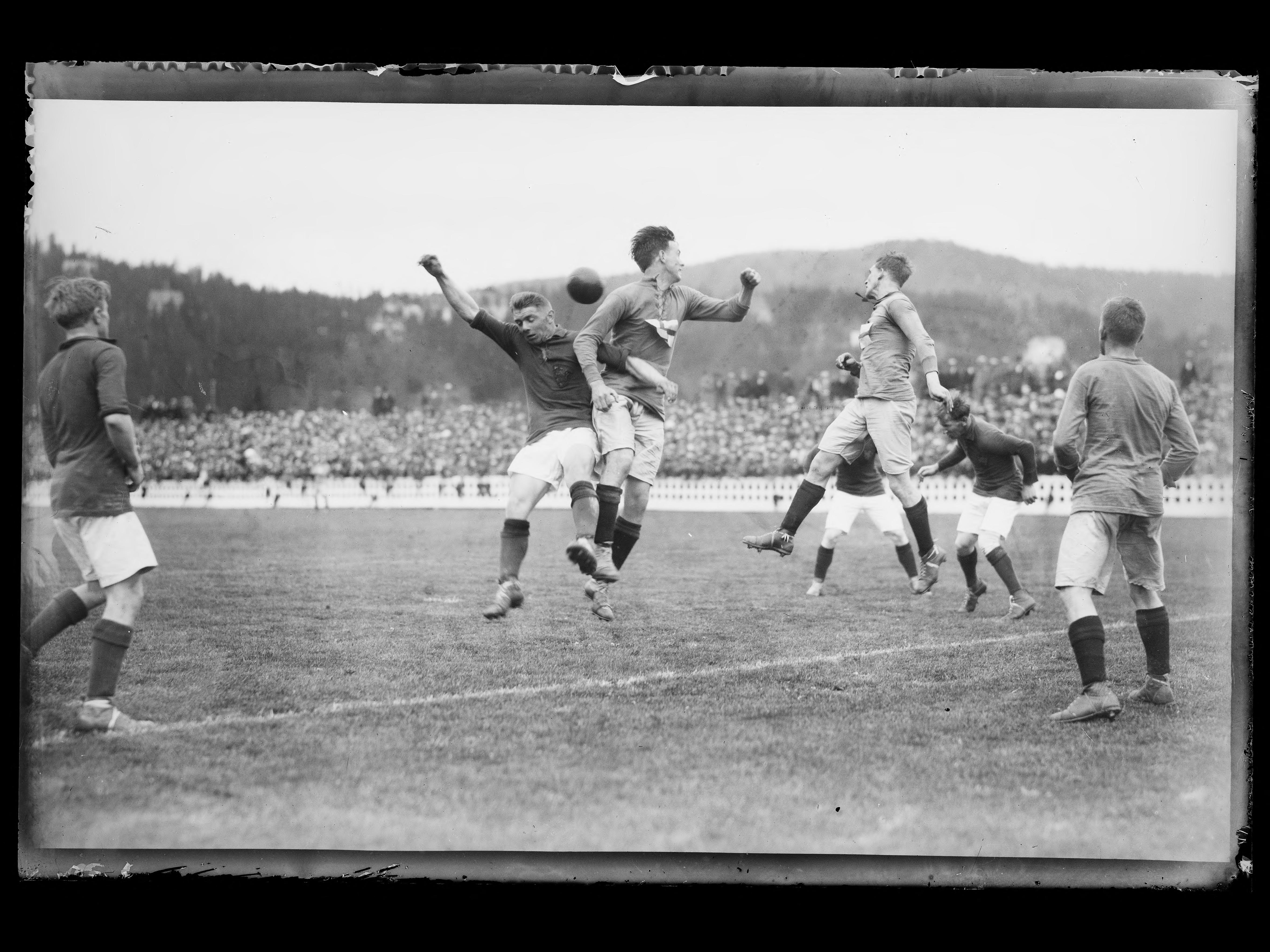 Bildet er hentet fra Nasjonalbibliotekets bildesamling. Anmerkninger til bildet var: Påskrift eske: Fotbolkamp 1921 Holmen Gressbane,Oslo, Oslo, Oslo